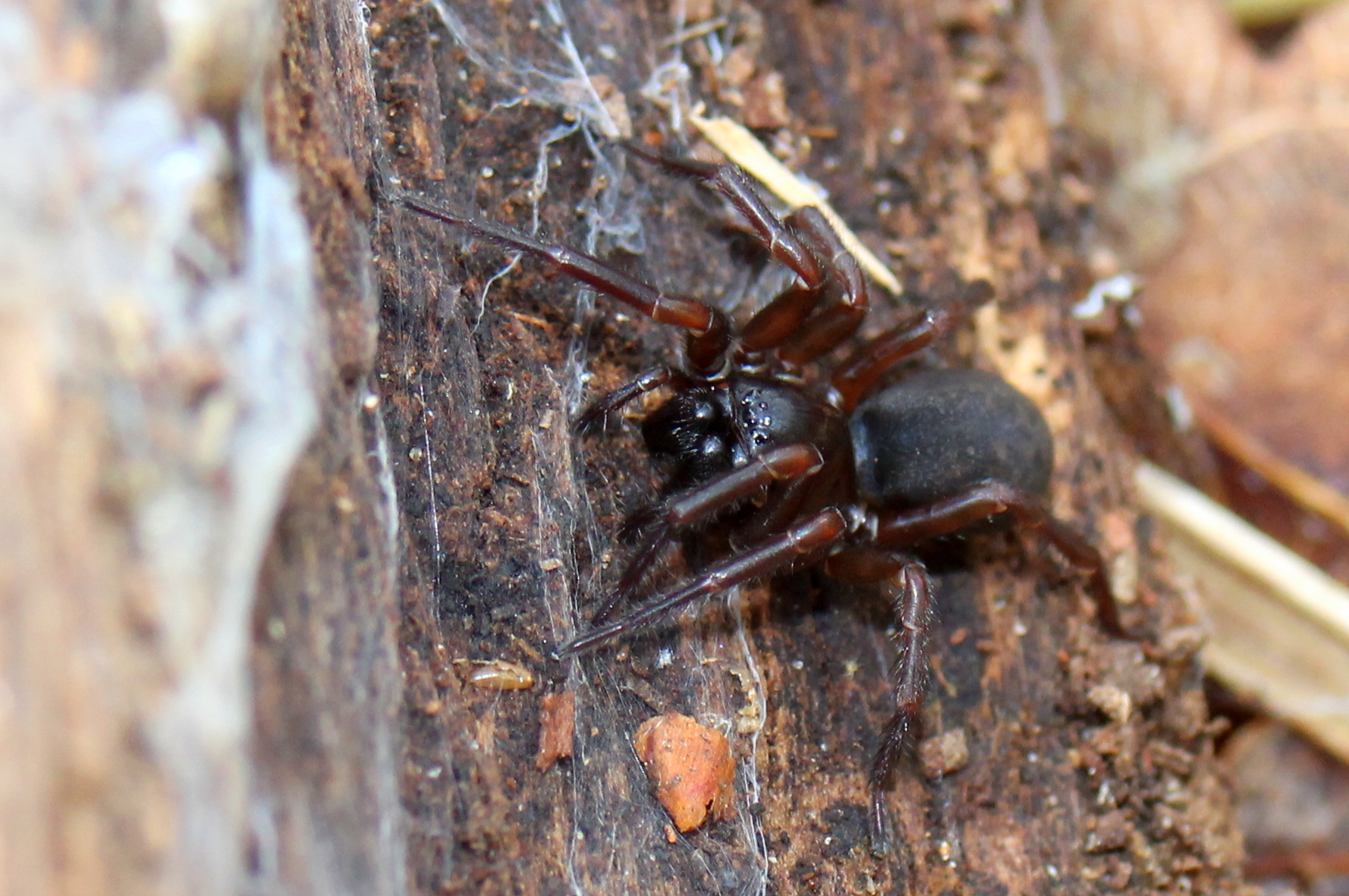 Spin in De Brand, Nederland